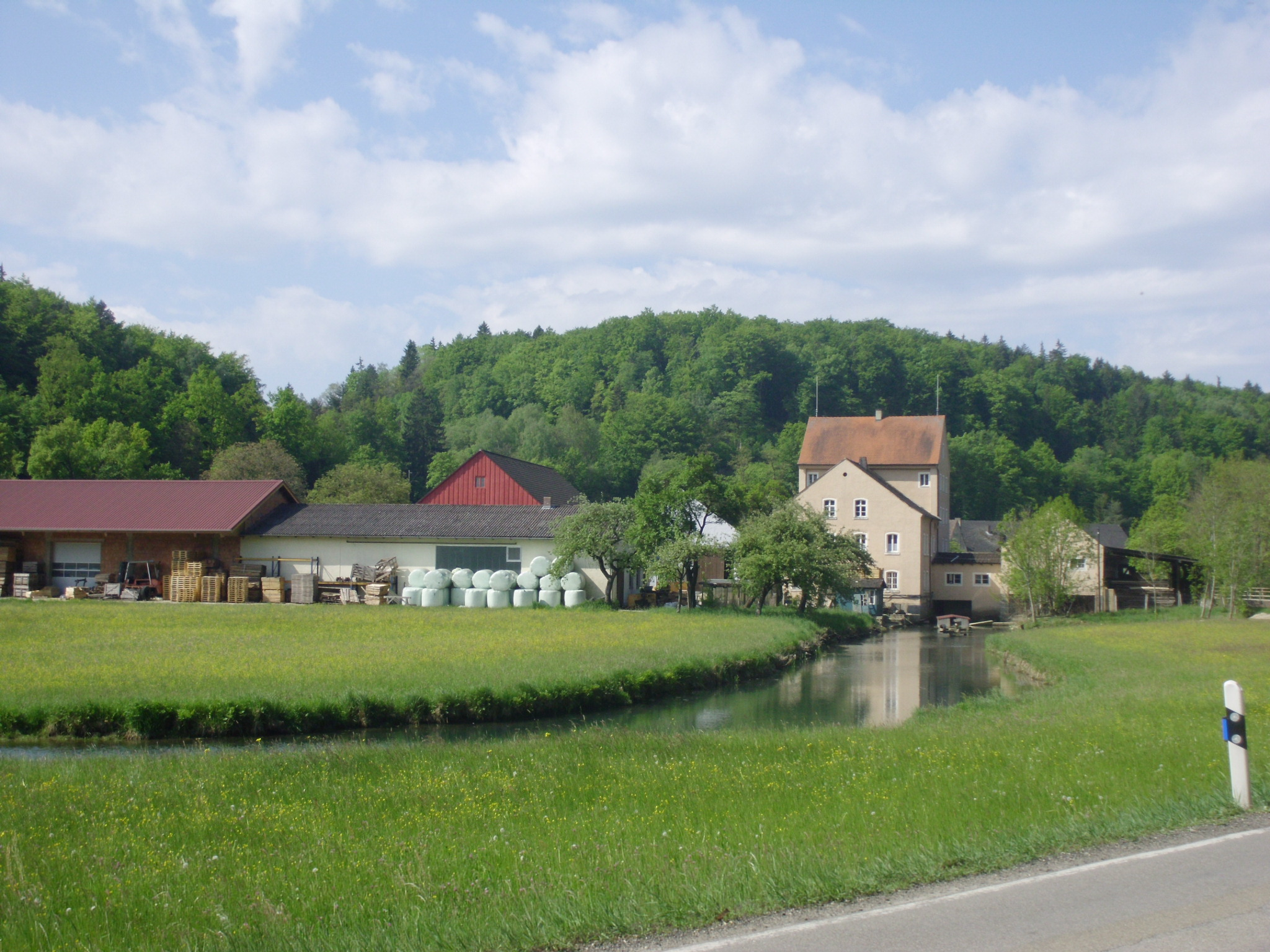 Schürmühle im Möhrenbach-Tal, Ortsteil der Stadt Treuchtlingen im mittelfränkischen Landkreis Weißenburg-Gunzenhausen (Bayern)